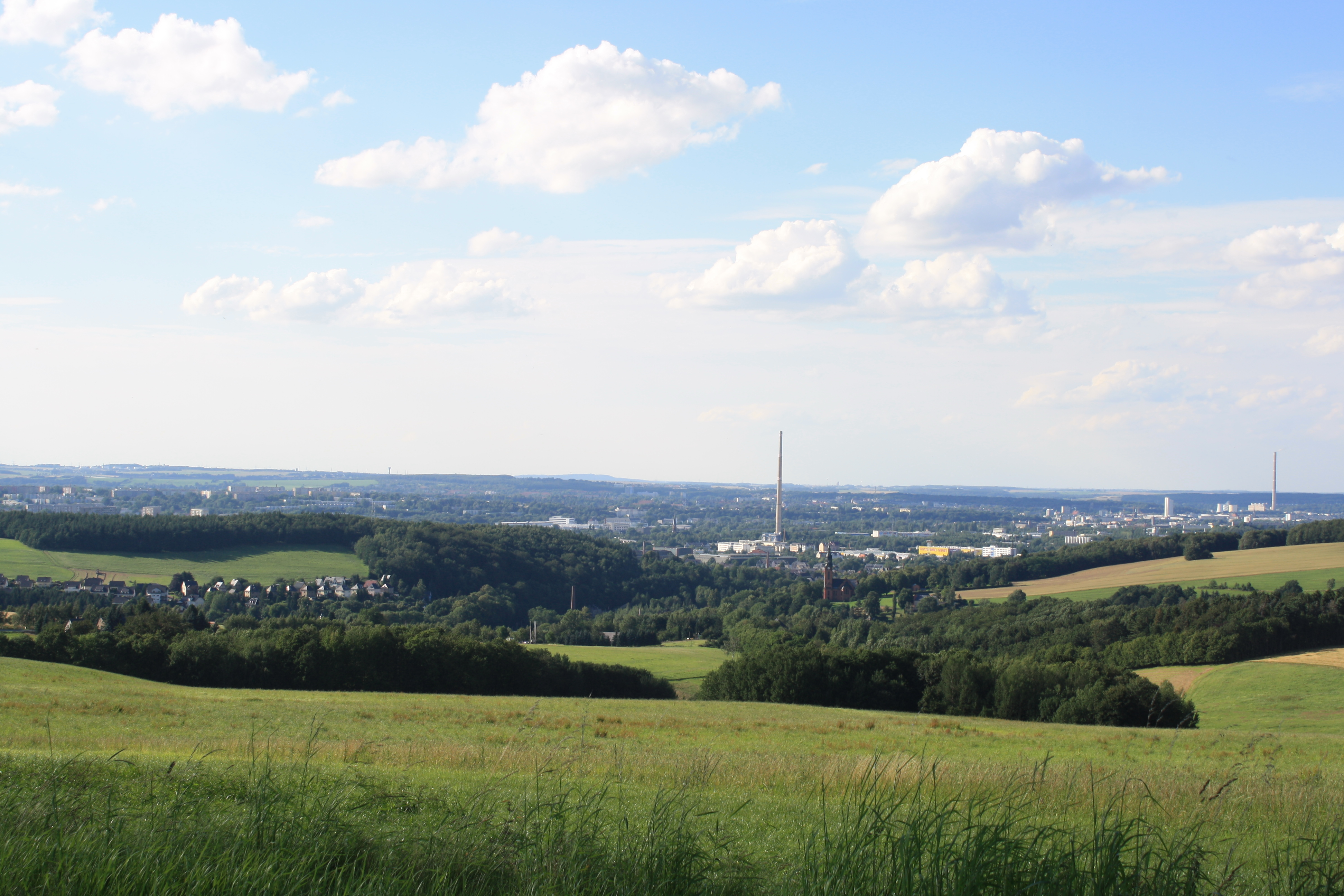 Blick nach Chemnitz - Harthau 2009